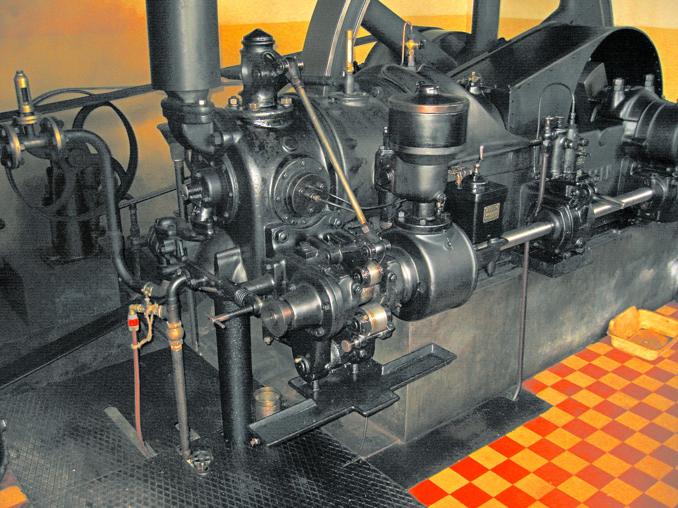 Dieselmotor Type H20 van de Molen De Nieuwe Molen in Sinderen, the Netherlands